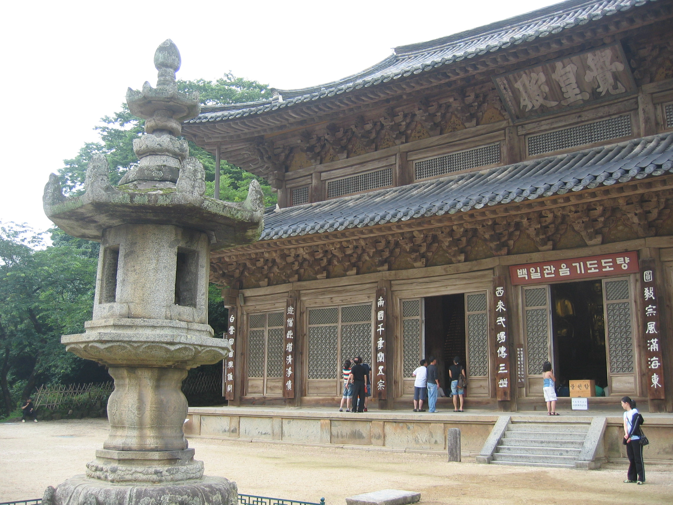 2006년 대한민국 지리산에 위치한 화엄사 각황전 및 대한민국의 국보 제12호 구례 화엄사 각황전 앞 석등(求禮 華嚴寺 覺皇殿 앞 石燈) Hwaeomsa, one of the Buddhist temples in Jirisan (Mt.Jiri), South Korea, 2006